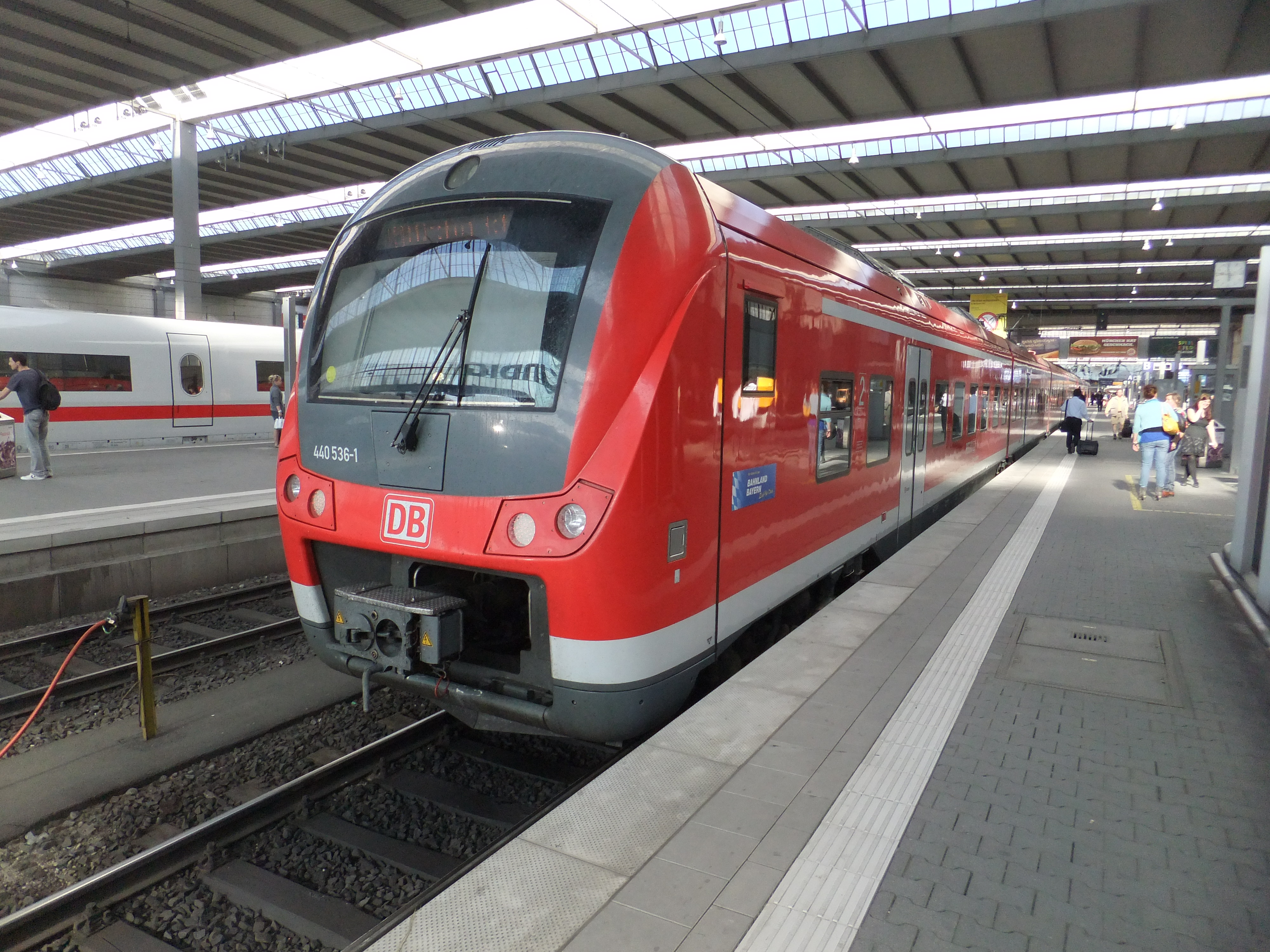 DBAG-Baureihe 440 (Alstom Coradia Continental) als Fugger-Express im Münchener Hauptbahnhof